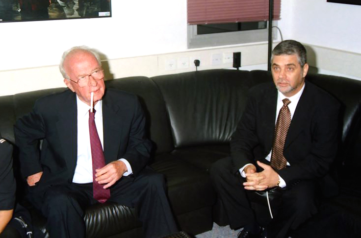 מנכ"ל משרד ראש הממשלה שמעון שבס וראש הממשלה יצחק רבין